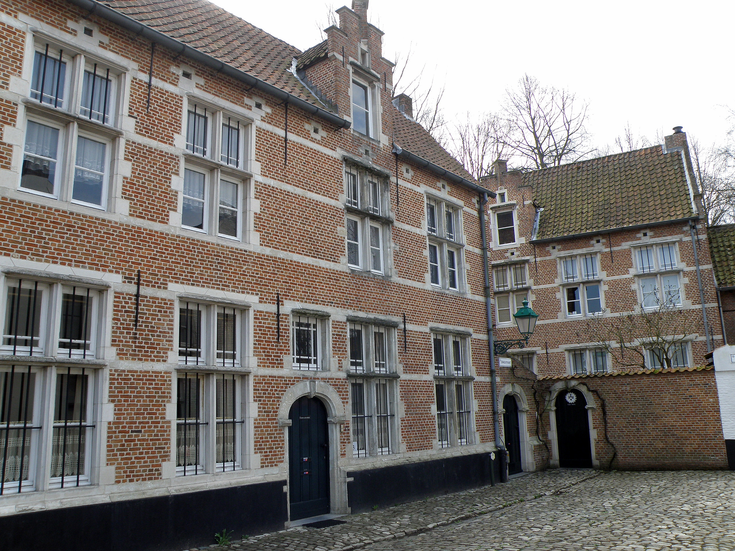 Lierre (en néerl. Lier), ville de Flandre (Belgique), située à une quinzaine de km. au sud-est d’Anvers. Béguinage, rue dénommée Grachtkant : à gauche, amorce sud du long alignement de maisons bordant la rue à l'est (1721-1726) ; à droite, maison T Soete Naemke (litt. doux nom, mêmes dates).